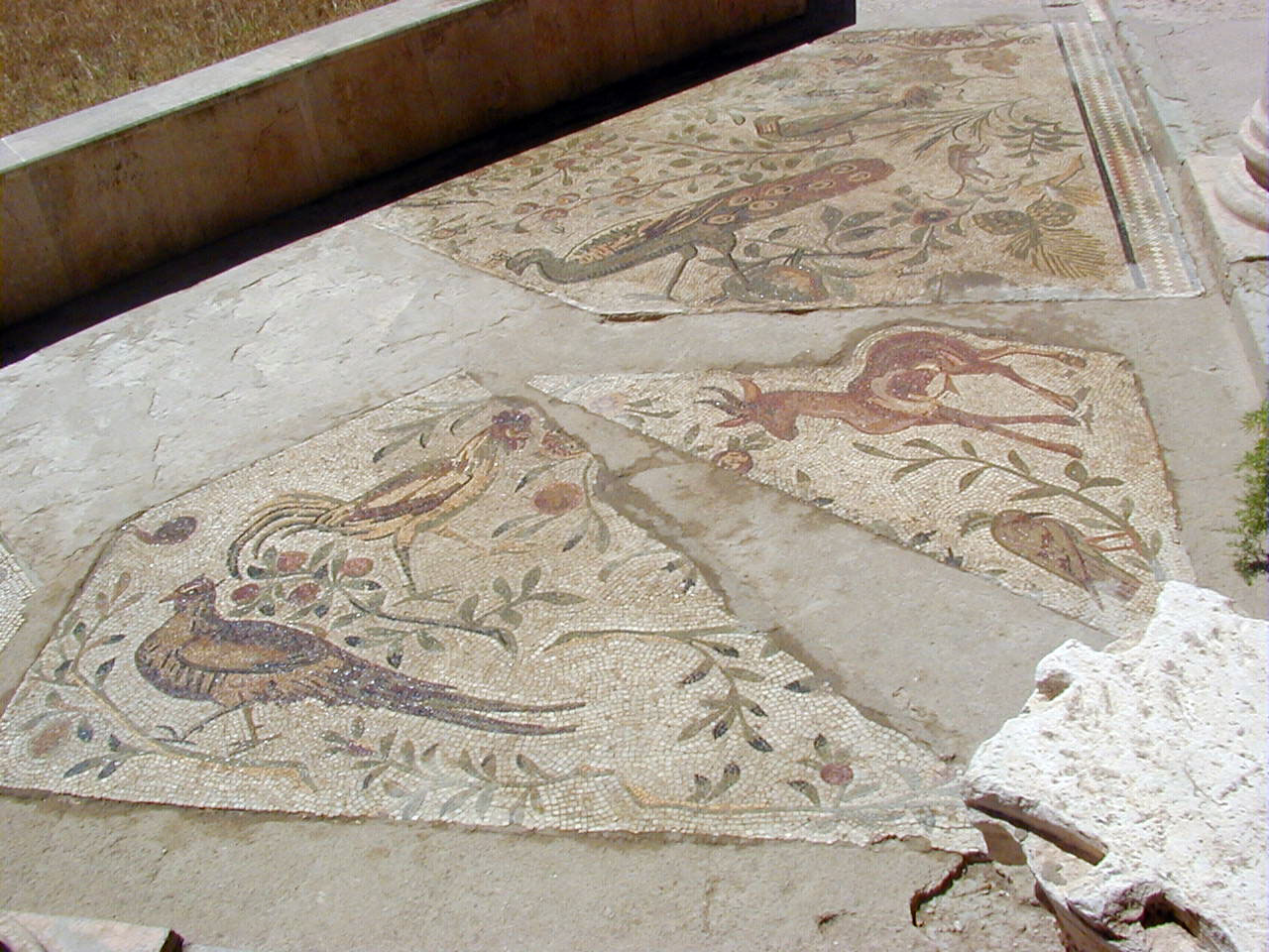 Mosaïque de la volière, Parc des villas romaines, Carthage